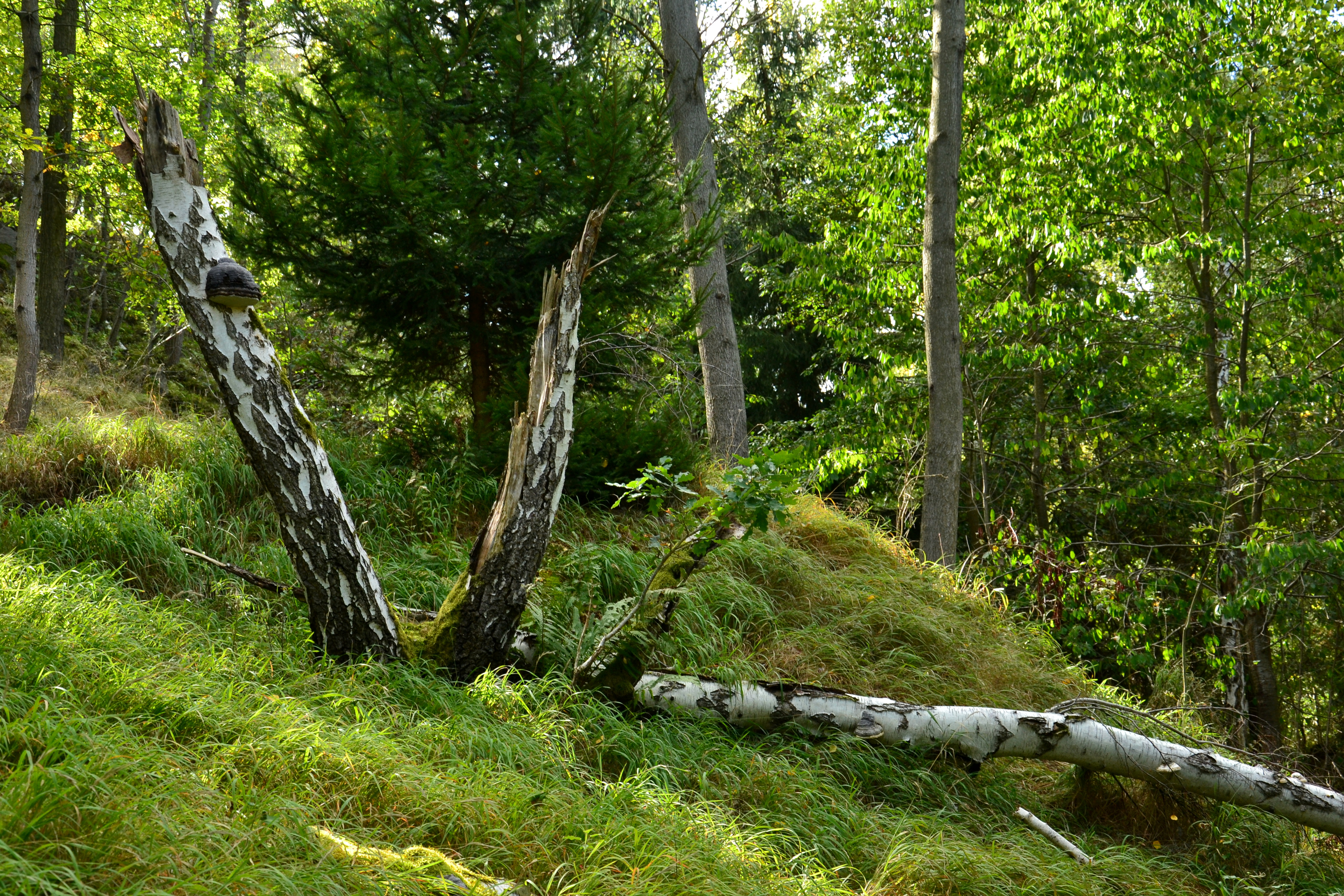 Úpatí údolního svahu